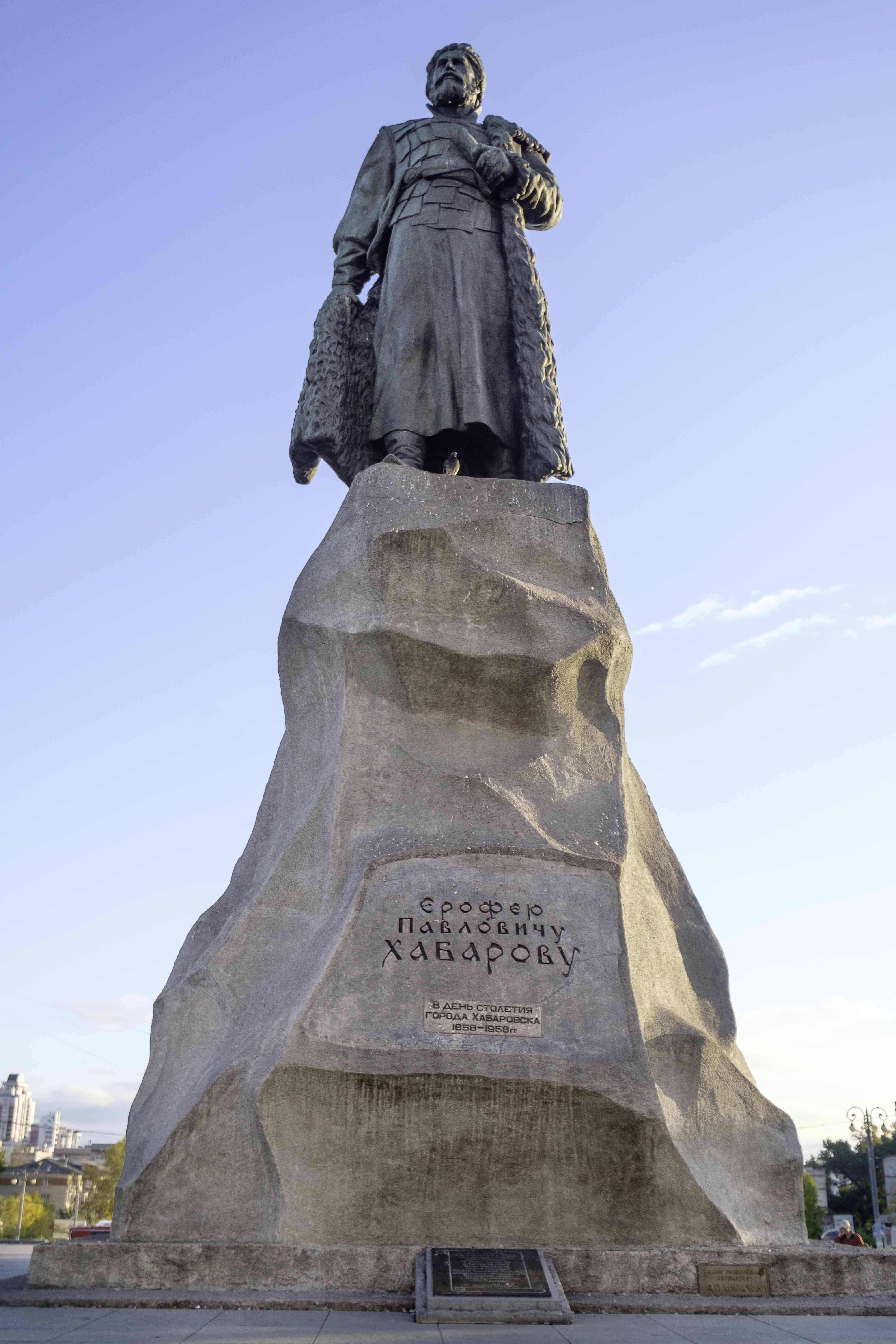 Monument voor Jerofej Chabarov voor Station Chabarovsk in Rusland